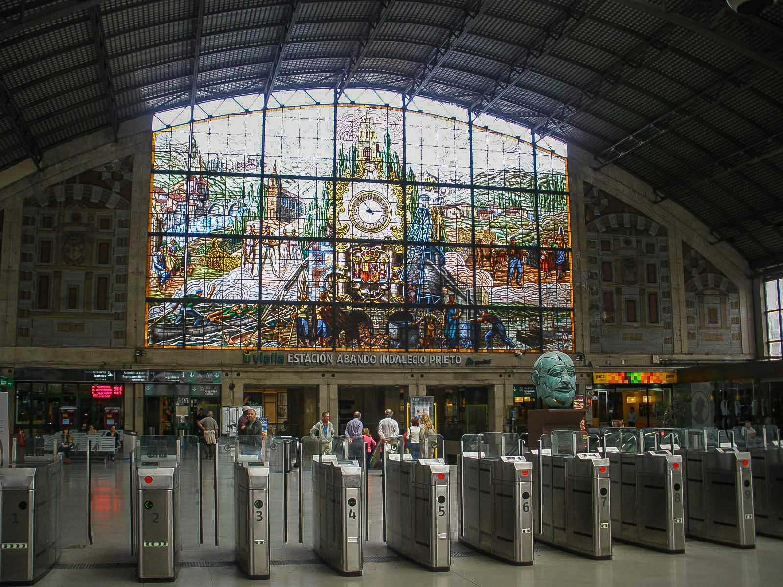 Estación de Abando Indalecio Prieto (Bilbao)